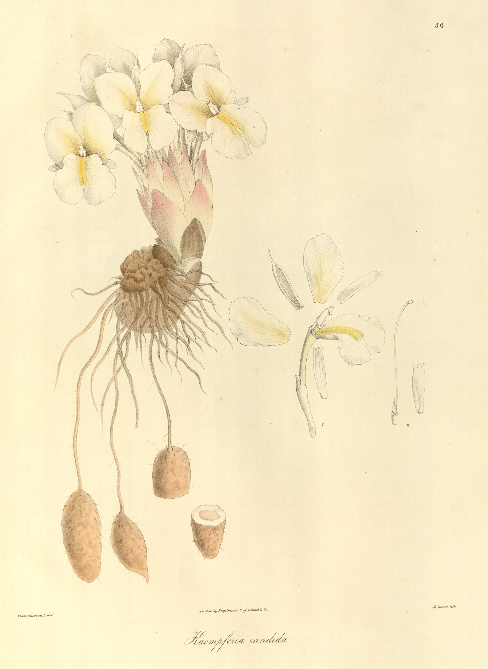 Kaempferia candida Wall. Planche 56 du "Plantae Asiaticae Rariores" de Nathaniel Wallich Vol 1 année 1830